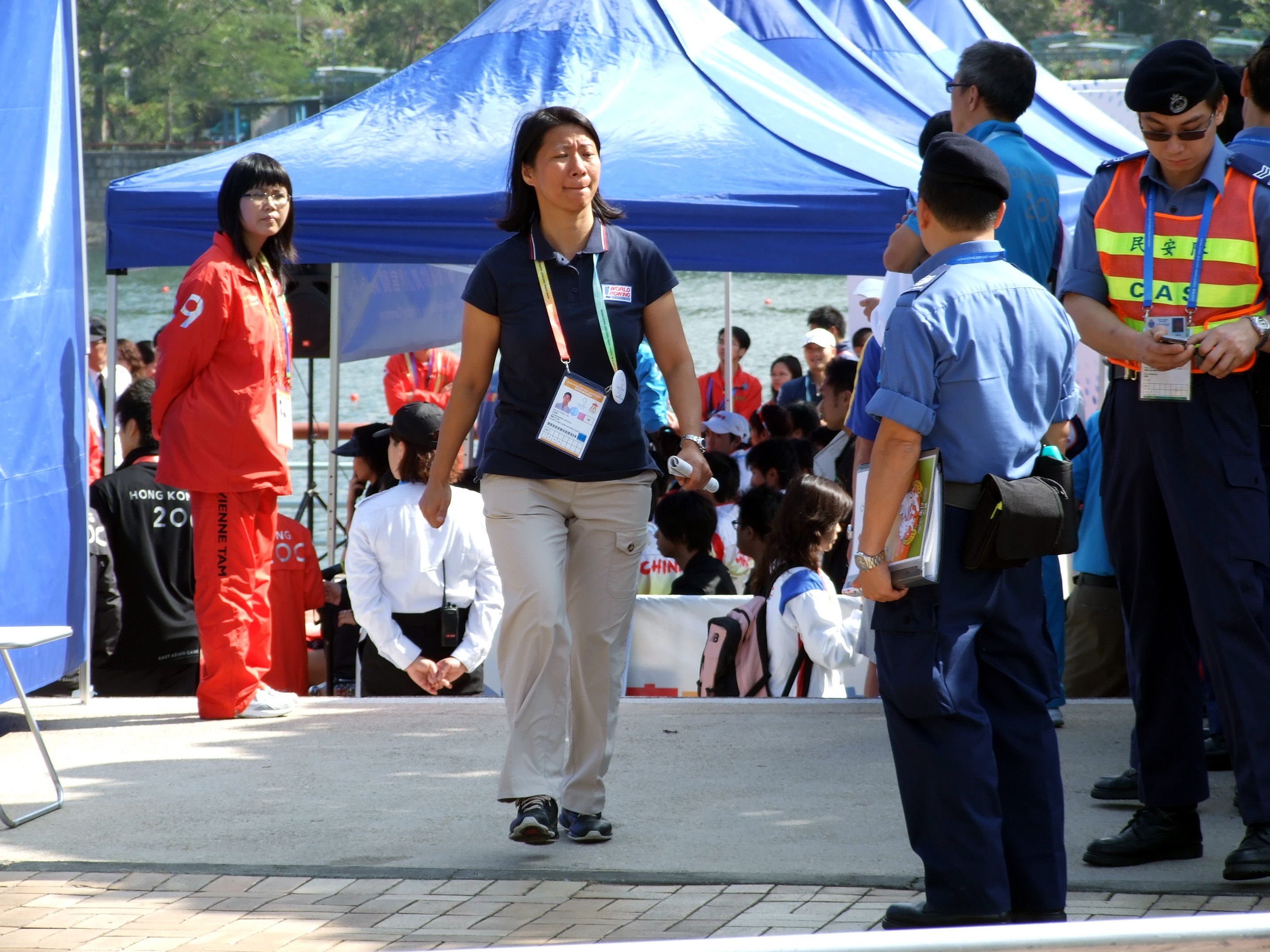 中文（香港）: 何劍暉